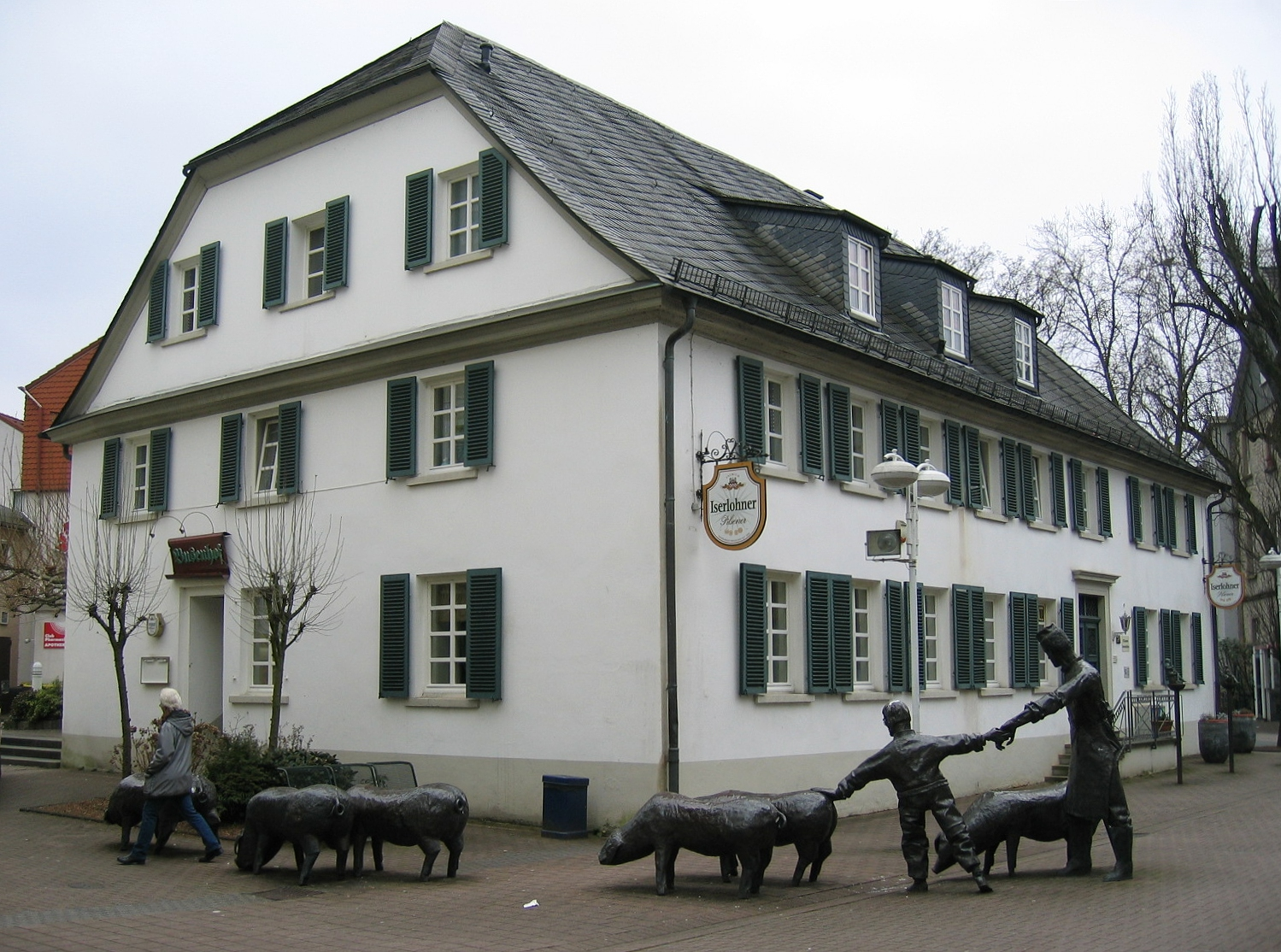 „Busenhof“ in Werdohl. Nach einem Brand im Jahr 1822 neu errichtet als Bauernhaus mit Gasthof. Klassizistisches Bürgerhaus in den Formen eines Reidemeisterhauses, Krüppelwalmtraufenhaus mit Pfannendeckung. Hinweis Denkmaltafel: Einer der nachweislich ältesten Siedlungspunkte Werdohls (vermutlich 12. Jahrhundert).